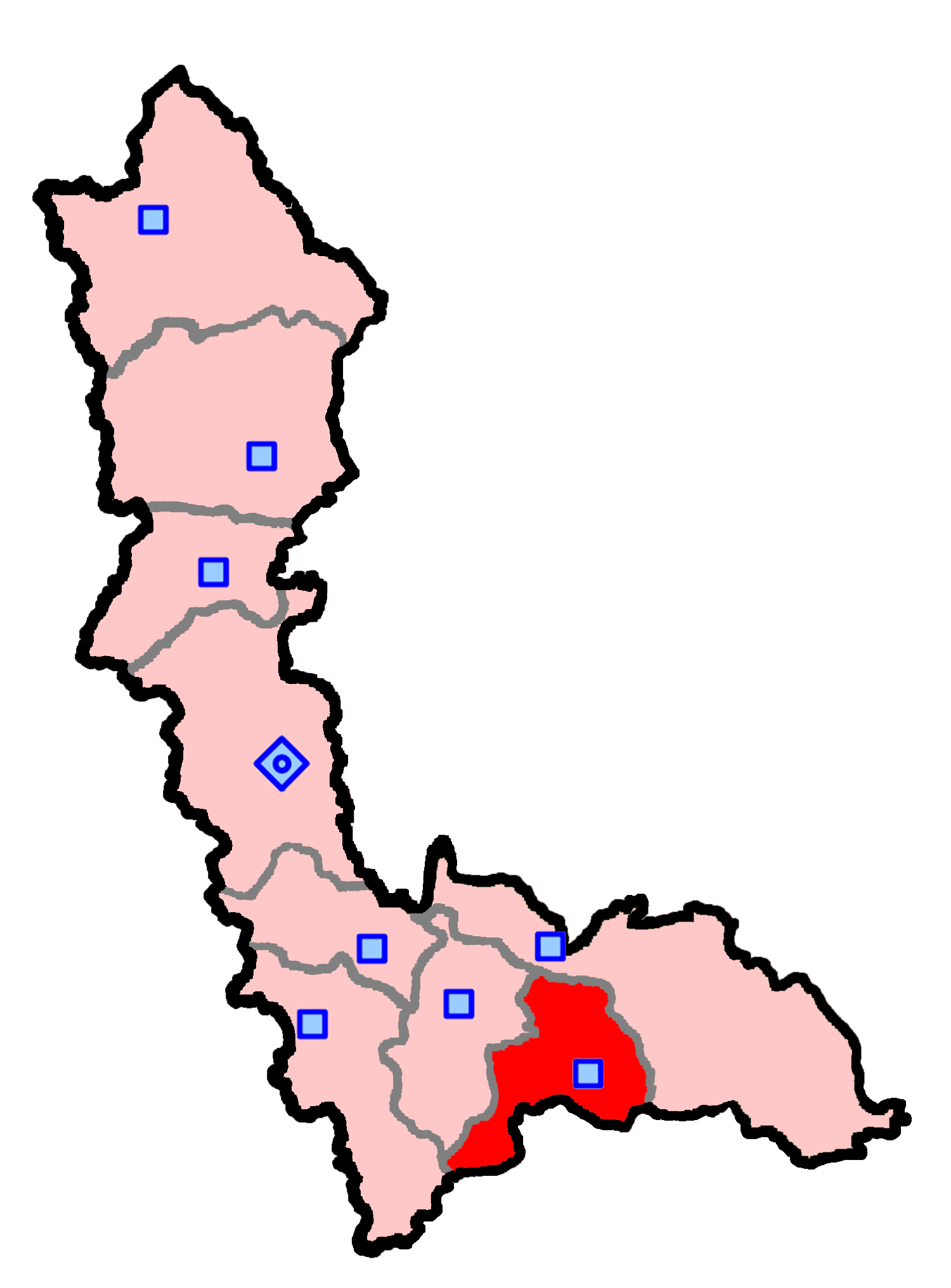 حوزهٔ انتخاباتی بوکان برای انتخابات مجلس شورای اسلامی